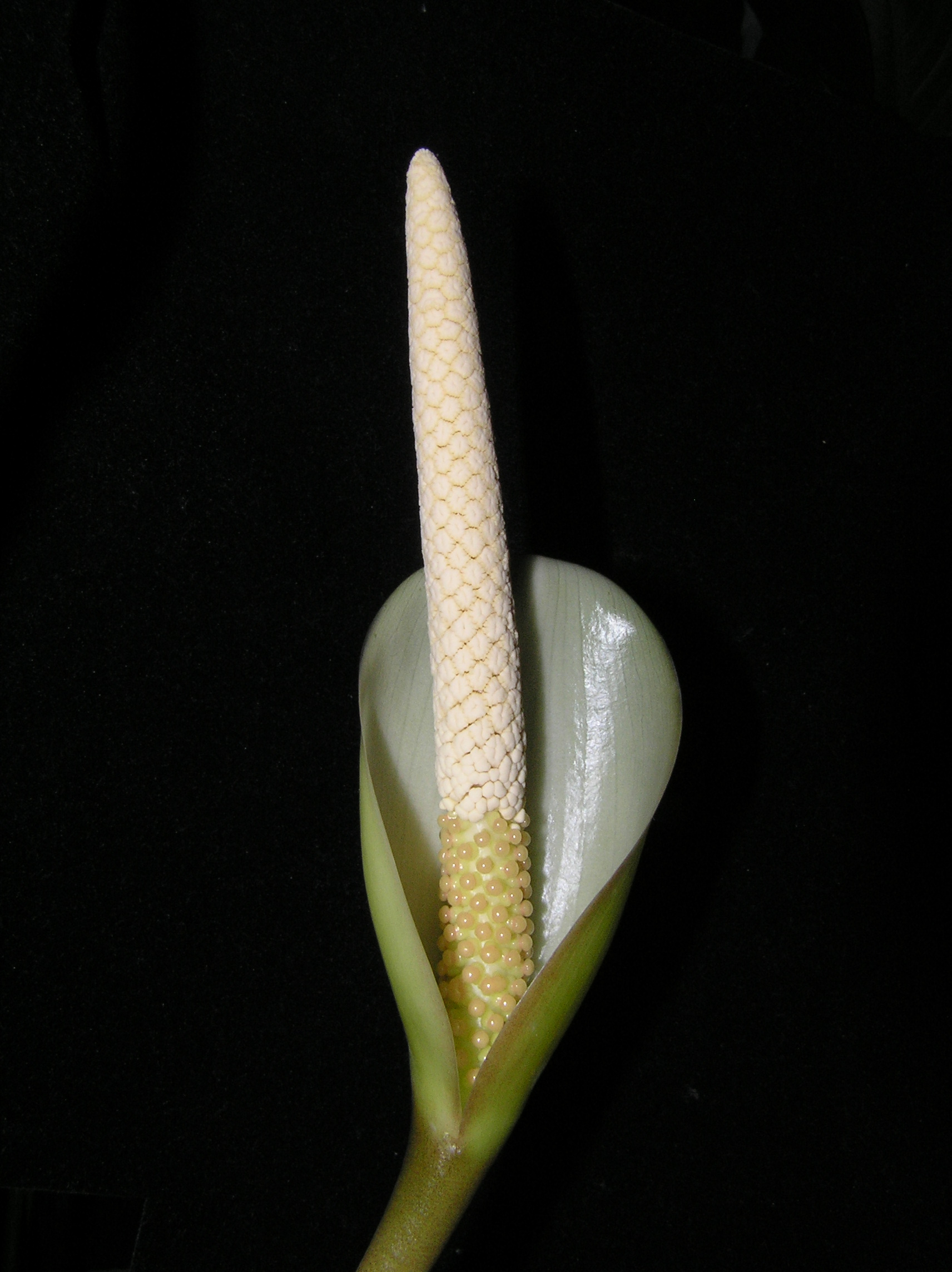 Соцветие анубиаса